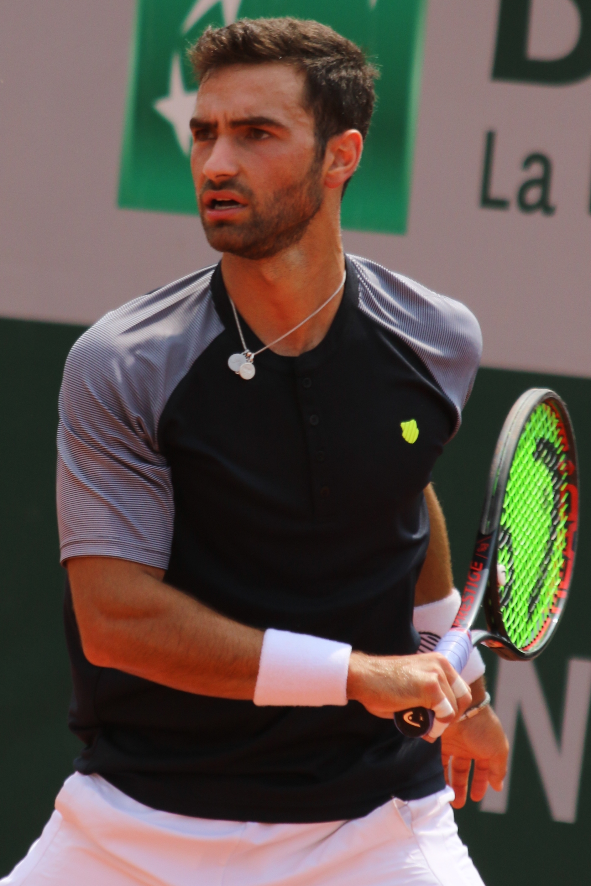 Rubin RGQ19 (52)